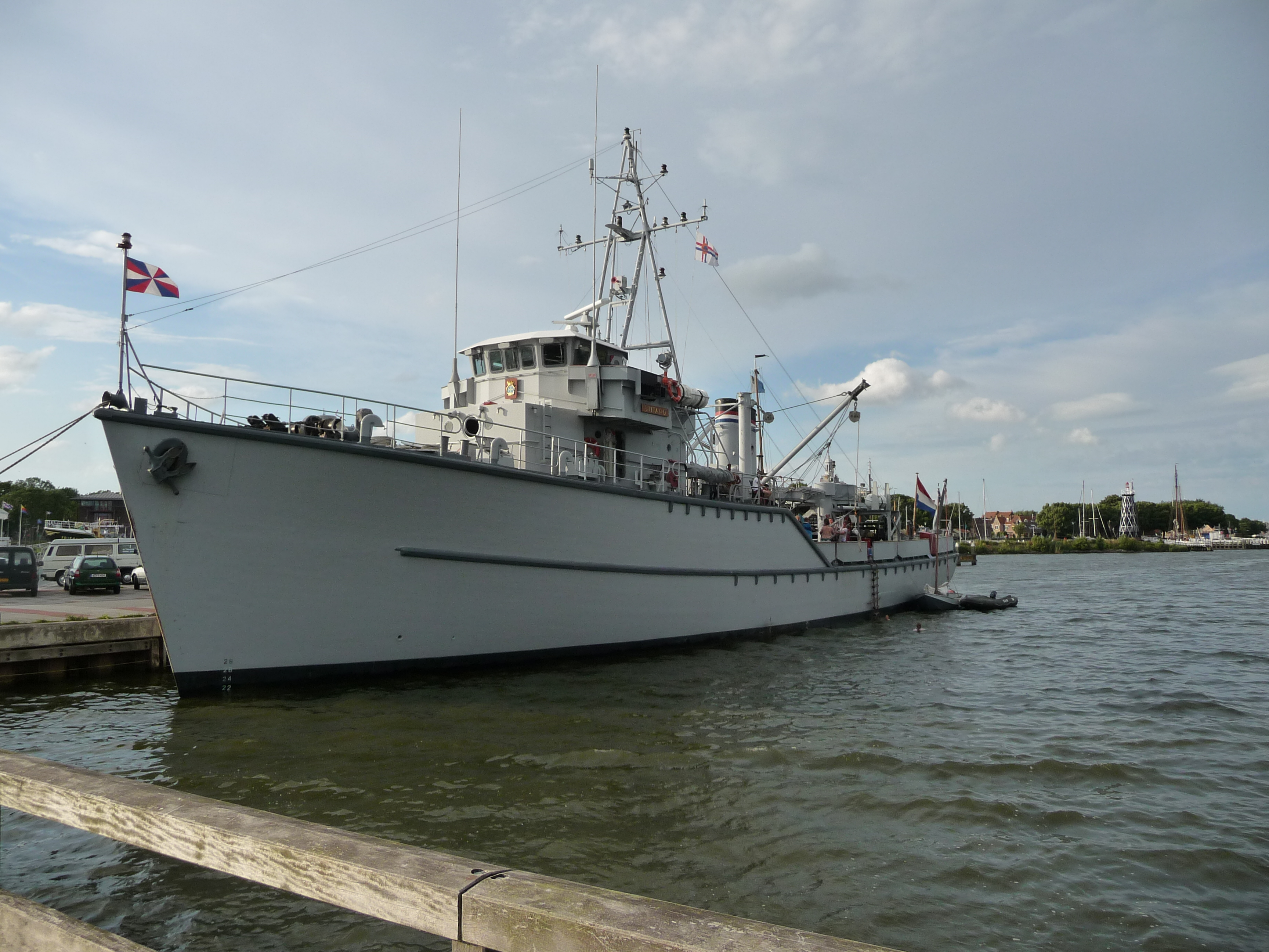 Ex-Hr. Ms. Sittard tijdens het jaarlijkse zomerkamp van het Zeekadetkorps Harlingen in Enkhuizen, juli 2009